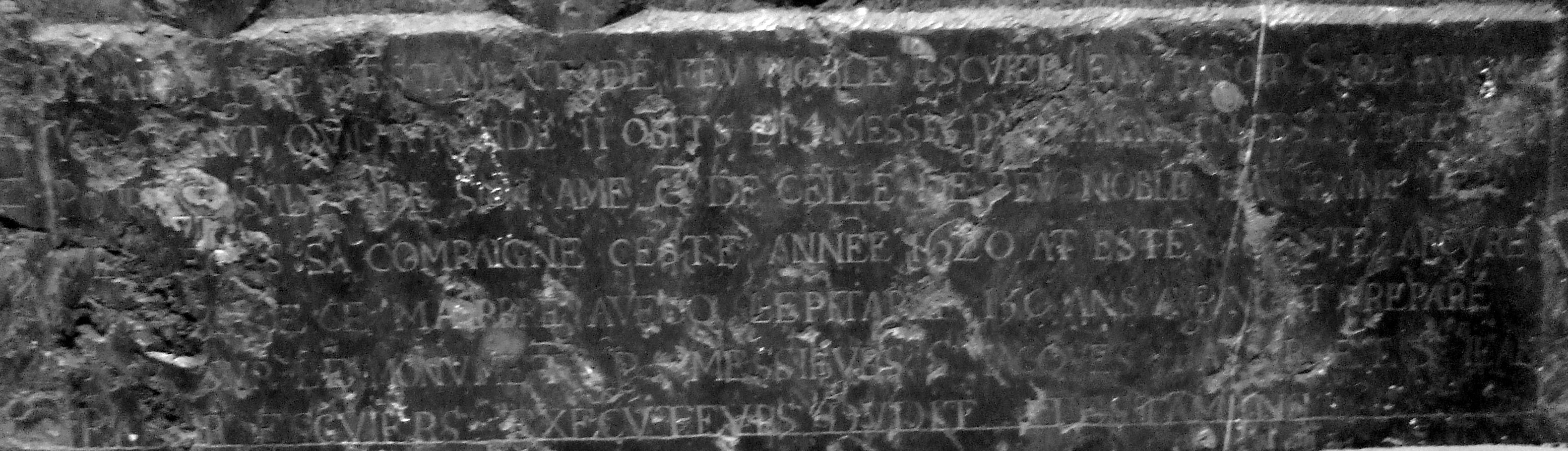 Pierre tombale de Jean Rasoir seigneur de Beuvrages , détail Inscription 1620, Hainaut, monument historique